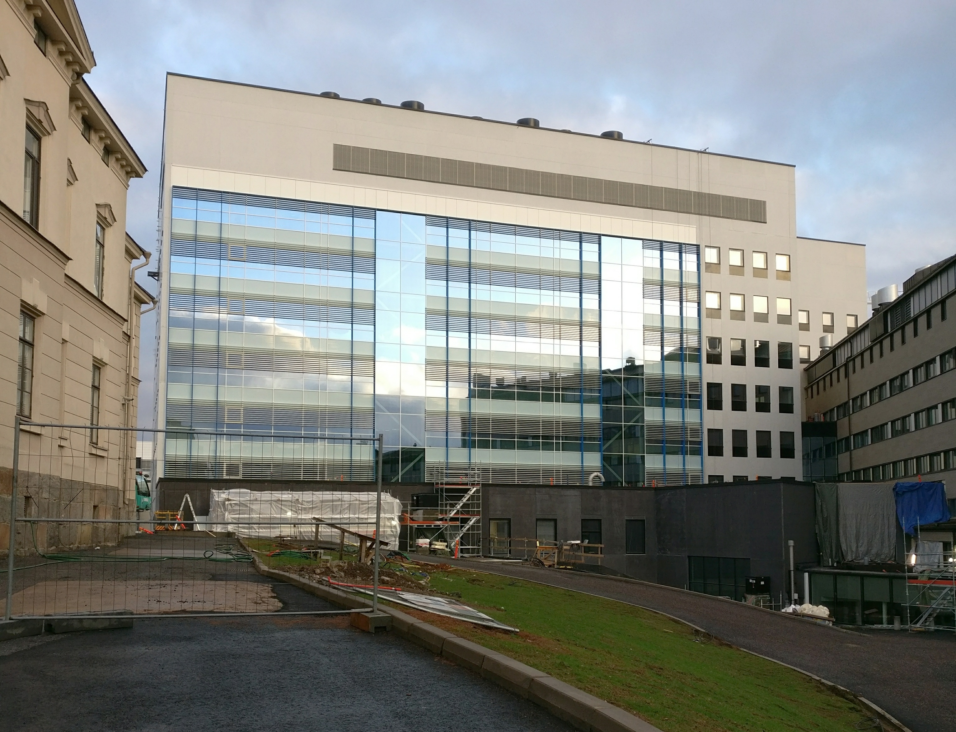 Medisiina D 30. joukukuuta 2017